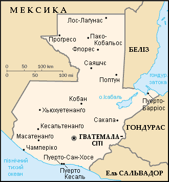 Мапа Гватемали.